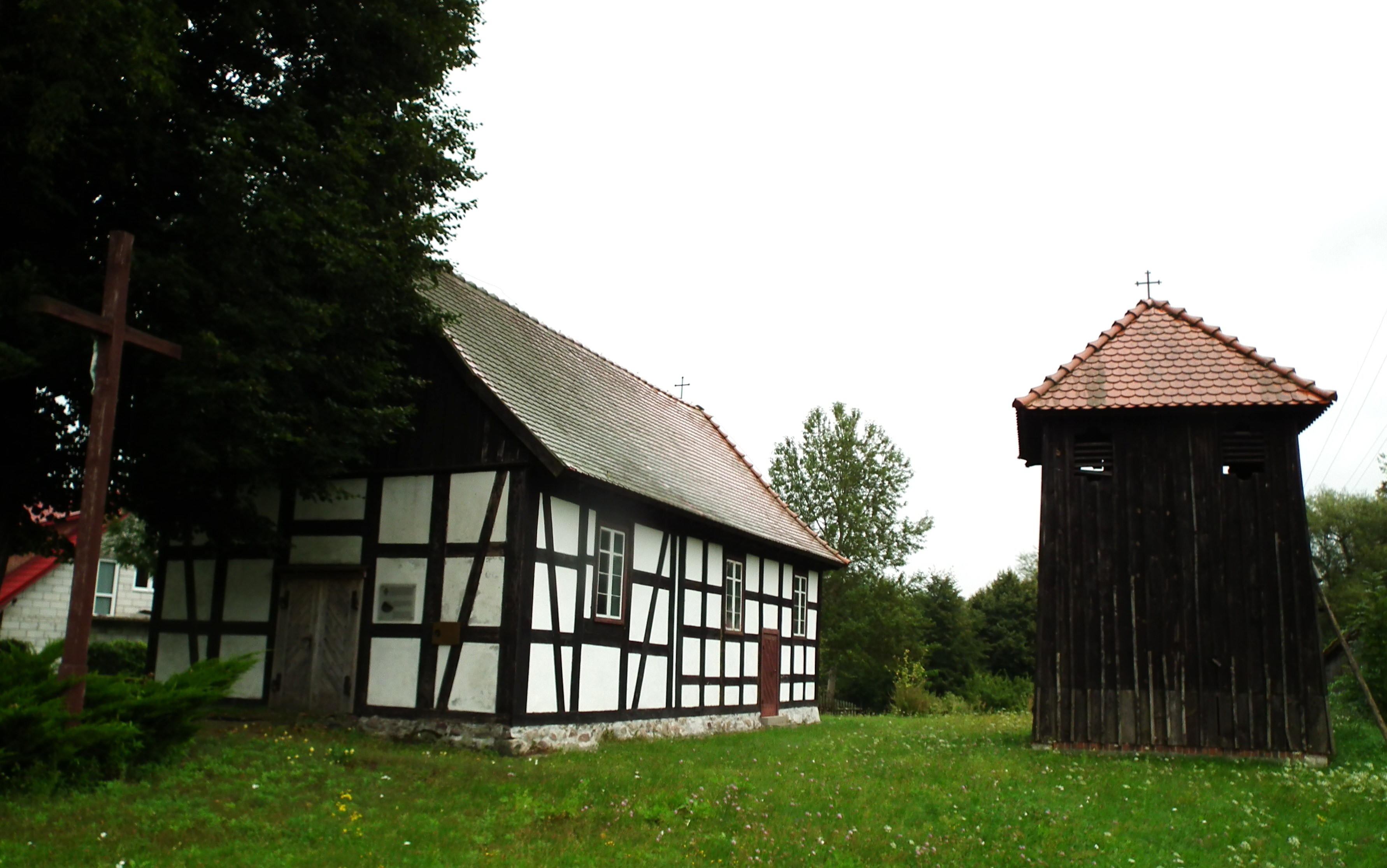 Kościół MB Różańcowej w Martwi k/Tuczna.